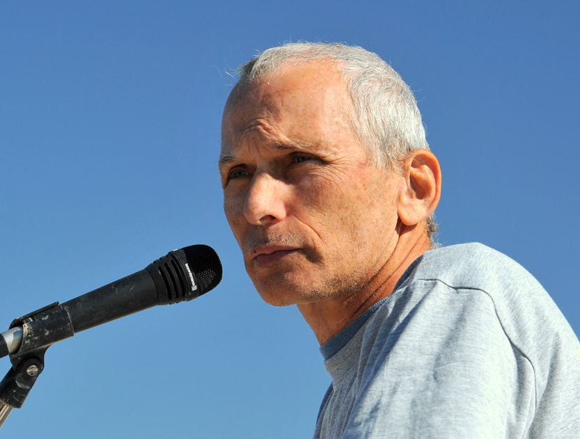 עומר בר לב נואם באירוע "אחריי"